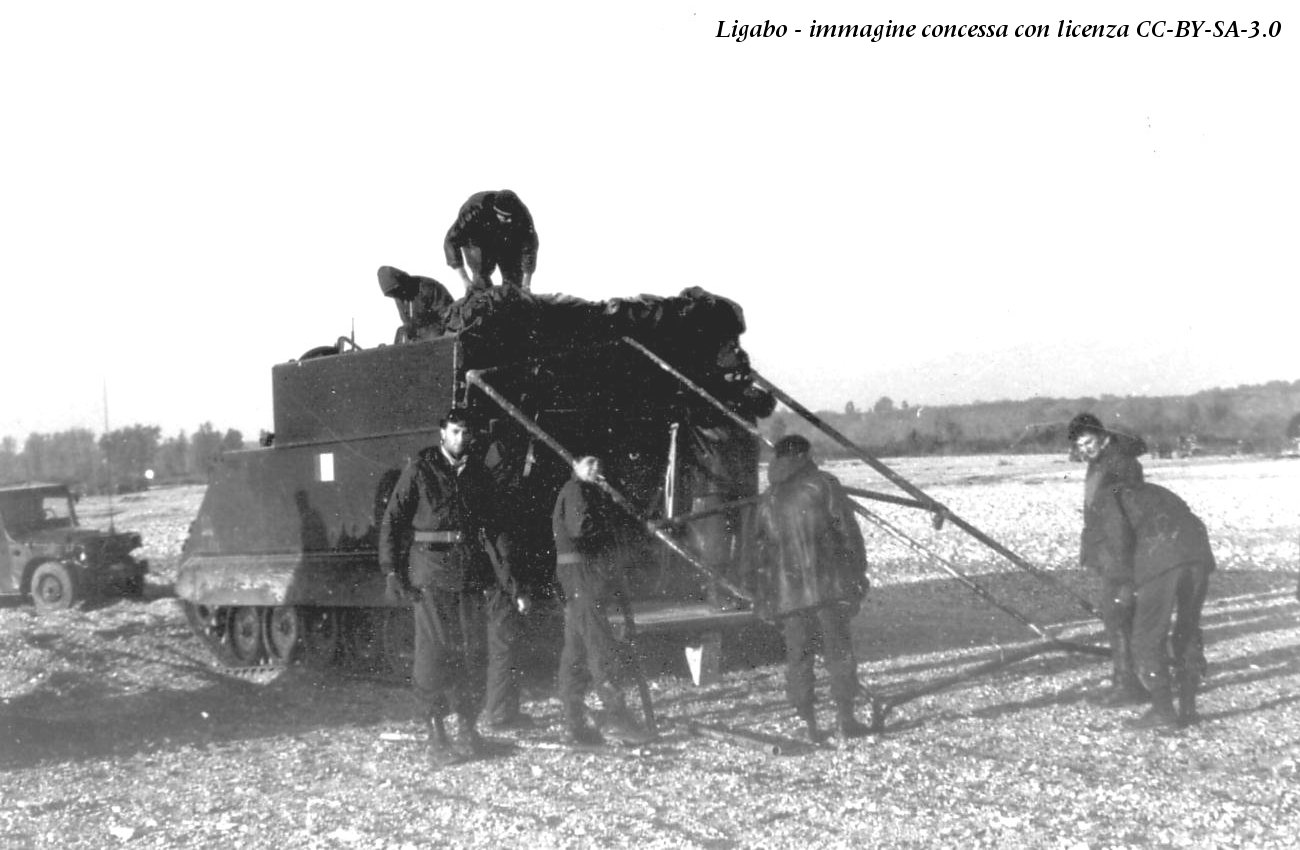 Artiglieri del 155º Gruppo Artiglieria Pesante Campale "Emilia" allestiscono la postazione di calcolo balistisco (Centro Tiro) per le batterie, nel novembre 1979.